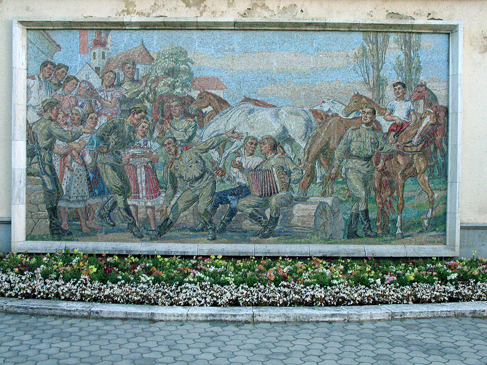 Exteriérová mozaika v Poprave